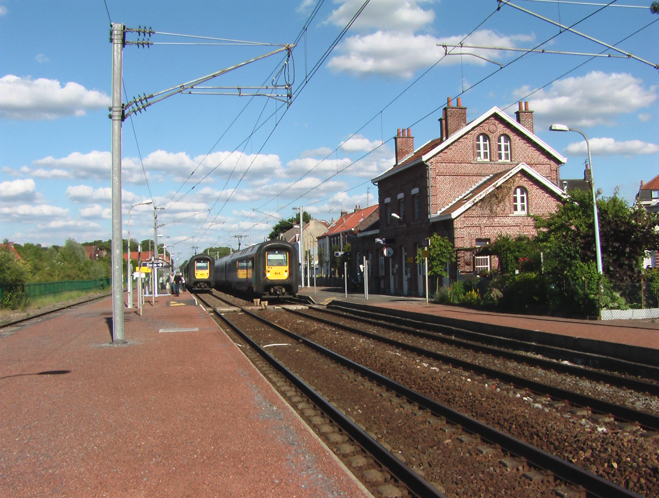 Deux trains belges se croisent en gare d'Ascq.